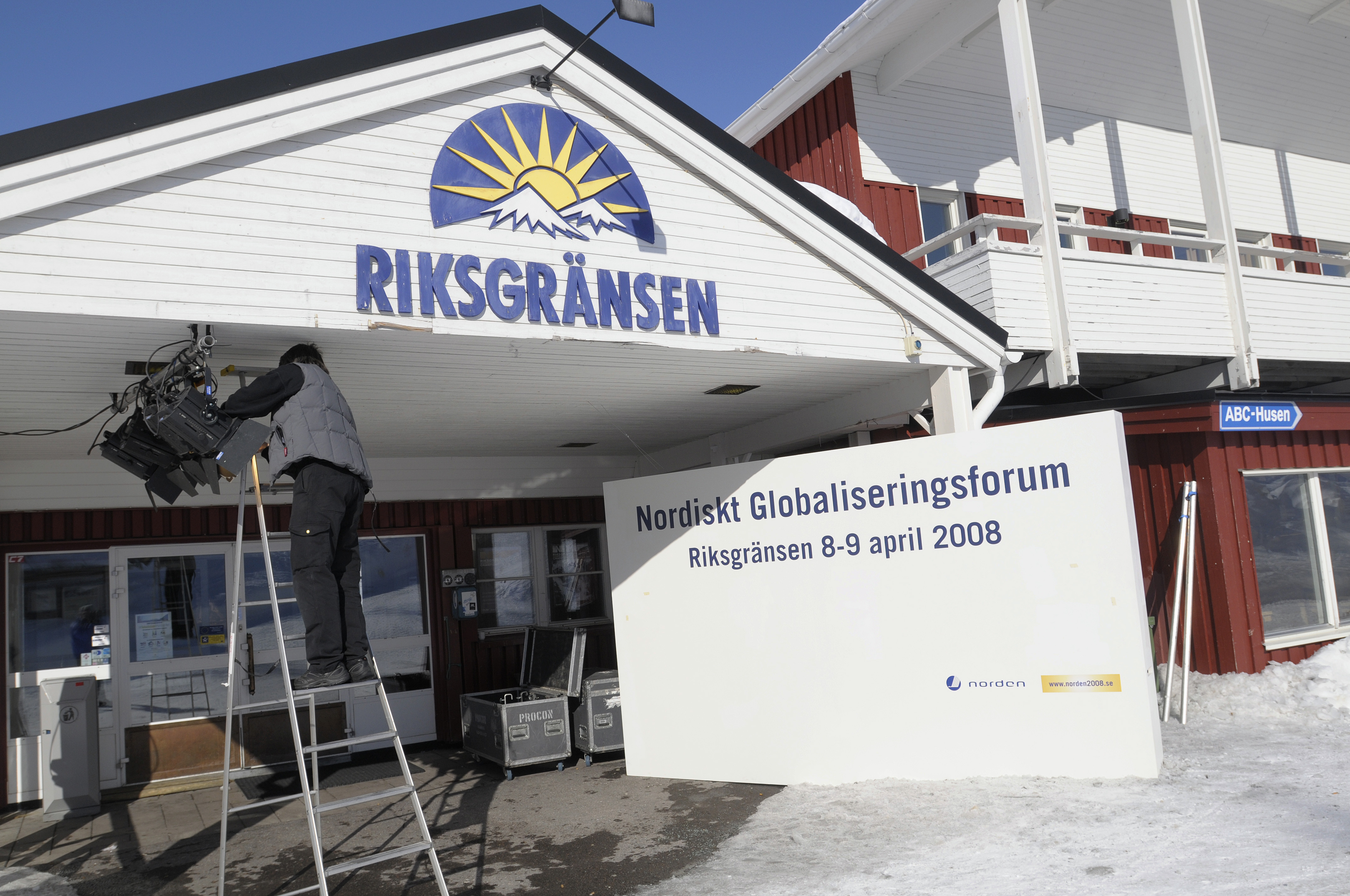 Förberedelser inför Nordisk globaliseringsforum i Riksgränsen 2008